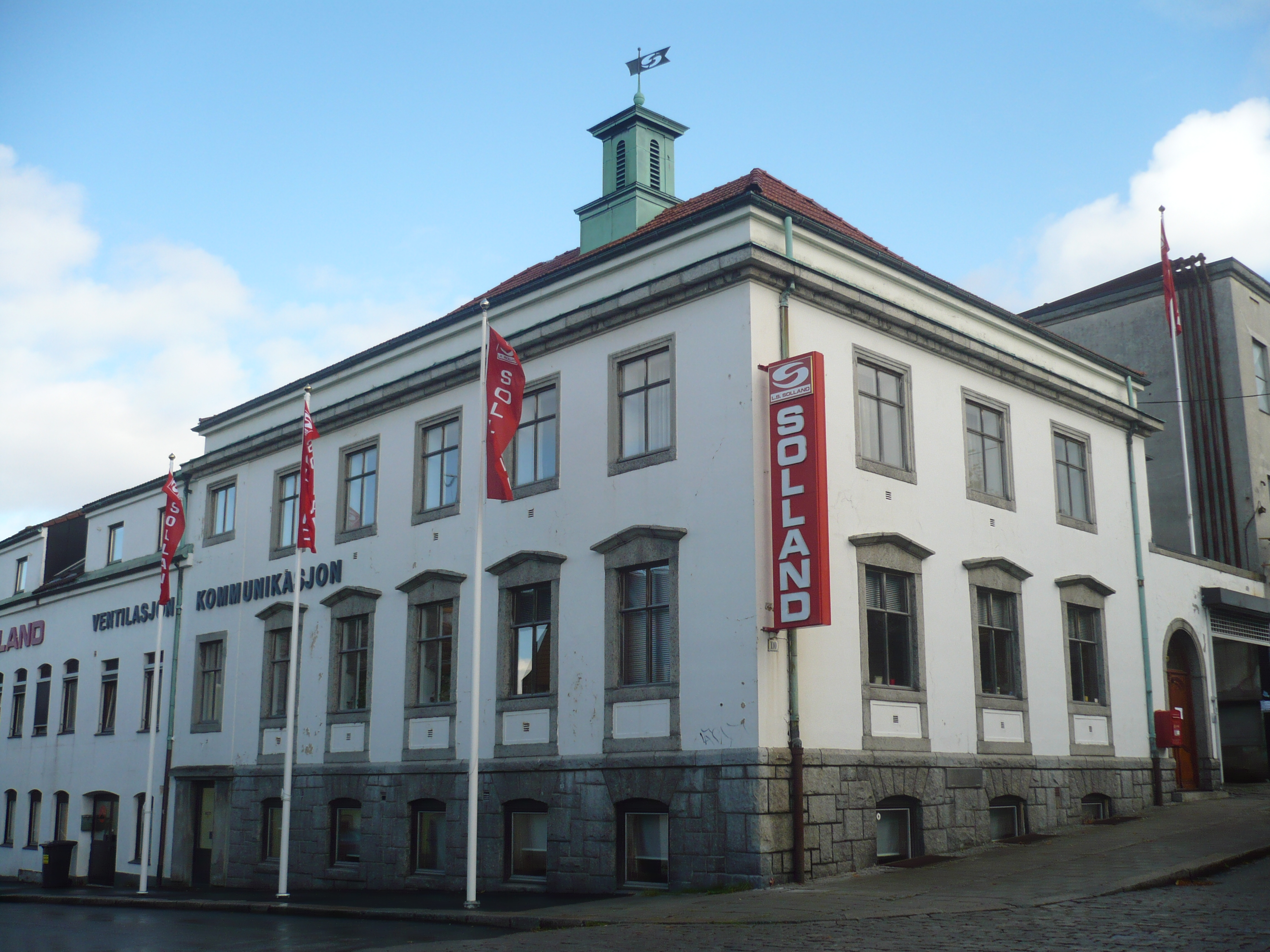 Pedersgata 110 i Stavanger.